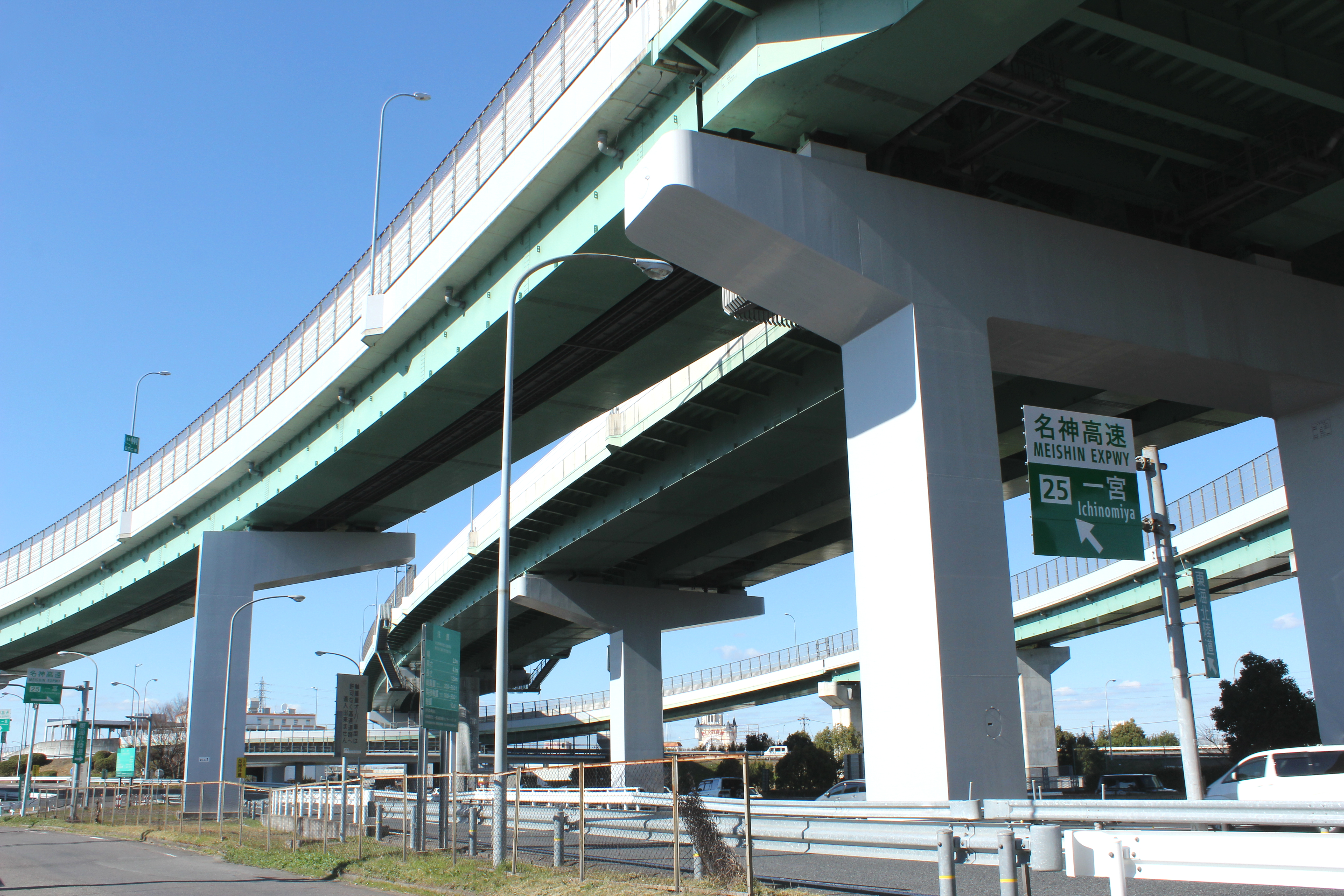 名神高速、名古屋高速 一宮IC